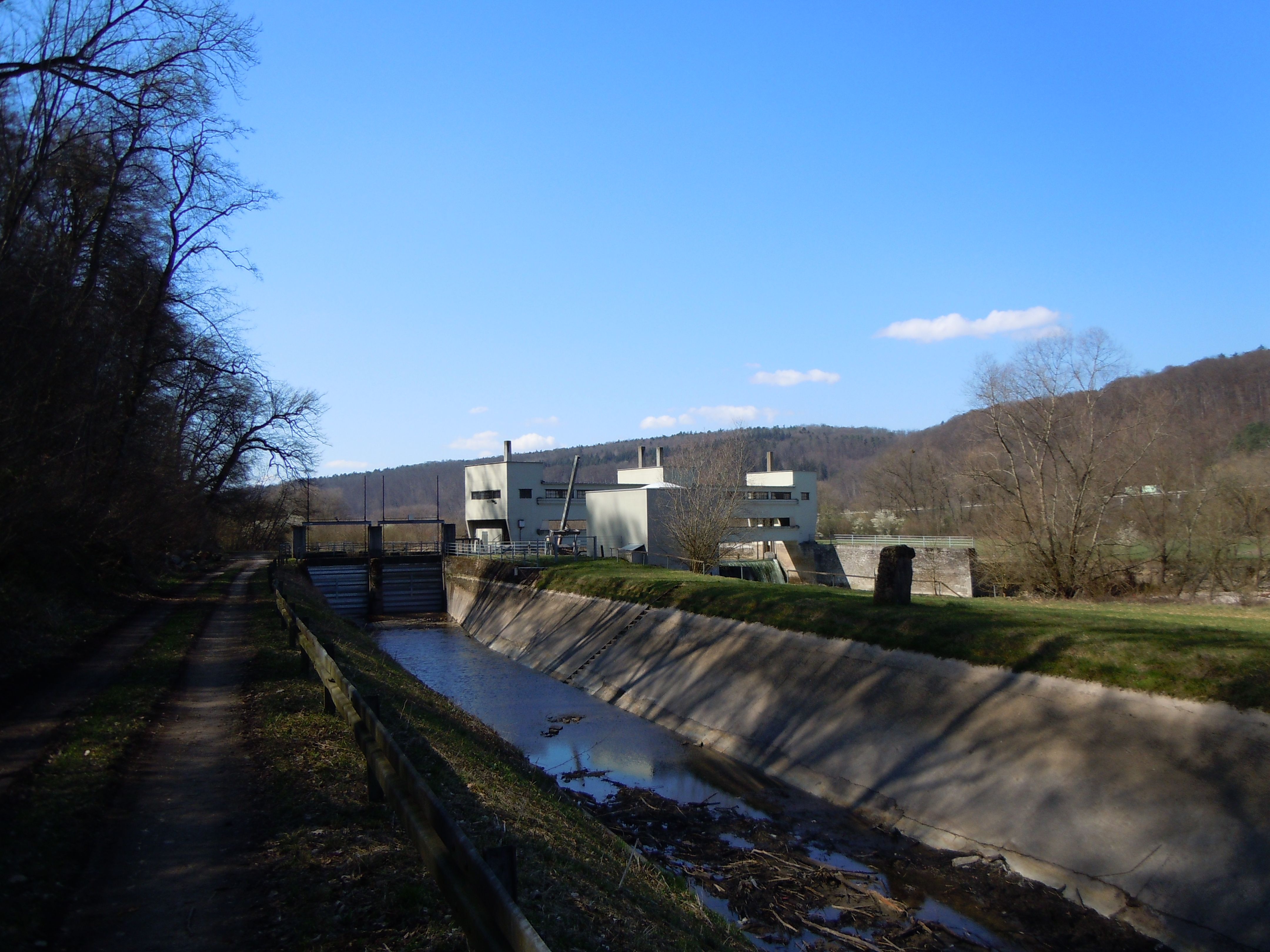 Am Tag der Aufnahme (28. März 2019) war der Neckarkanal wegen Wartungsarbeiten im Kraftwerk nicht geflutet.